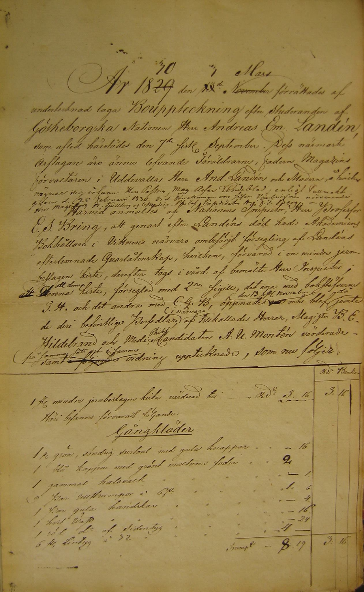 Första sidan av Andreas, ibland kallad Anders, Emanuel Landéns, mördad i Locus Peccatorum 1829, bouppteckning